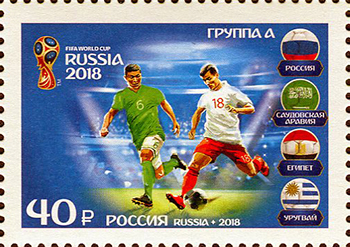 Группа А.